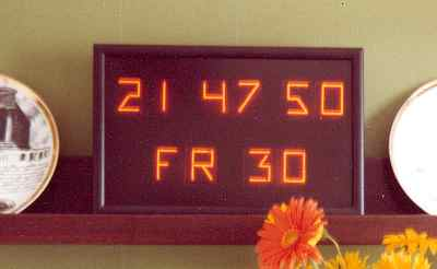 Mikroprozessor-Funkuhr 1978: Deutsches Uhrenmuseum Furtwangen Erste Funkuhr mit einem Mikroprozessors und einem analog aufgebauten Langwellenempfänger 77,5 kHz. Die in Assembler geschriebene Software für den Motorola µP6802 prüft aufeinanderfolgende Empfangstelegramme auf ihre logische Richtigkeit und überträgt erst dann die Zeitinformation in den internen Speicher, wo sie autark weitergeführt wird. Nur um Mitternacht und um 2 und 3 Uhr wird das Empfangssignal erneut verglichen; damit wurden erstmals Fehlanzeigen, verursacht durch die relativ häufigen Empfangsstörungen auf Langwelle, eliminiert. Als Anzeige kam die neuartige 16-Segment-Gasentladungsanzeige von Telefunken / Ulm zum Einsatz, dadurch war erstmals eine flache, hängbare Gestaltung möglich. Alle Segmente der Anzeige werden über ein langes CMOS-Schieberegister angesteuert, jede Sekunde wird die Ein-/ Aus-Information aller Segmente übertragen. Durch den Einsatz eines Mikroprozessors wird eine zuverlässige Anzeige auch bei schwachem oder gestörtem Empfang ermöglicht. Der Ansatz der Diplomarbeit von Hans Layer bei Prof. Dr. Richard Mühe an der FH Furtwangen war, eine funkgesteuerte Uhr zu entwickeln, die als Serienprodukt im Privatbereich die bereits verbreitete Quarzuhr ersetzen kann. Dazu wurden die Mikroprozessor-basierte Hardware und die Software komplett entwickelt und in zwei Prototypen umgesetzt. Die Fehlerkorrektur wurde im Uhreninstitut der Uni Stuttgart (Prof. Dr. Glaser) positiv getestet. Prototypen: im Uhrenmuseum Furtwangen und bei Dipl.-Ing. (FH) Hans Layer in Ulm, Foto von 1978. Der Uhr-Macher erinnert sich: Bei der Pressekonferenz der FH Furtwangen wurde von Vertretern der anwesenden Uhrenindustrie (u.a. KUNDO und JUNGHANS) damals bekundet, dass dies zwar ein interessanter Ansatz sei, es aber keinen Markt für eine Gebrauchsfunkuhr gebe und viel zu teuer sei ...